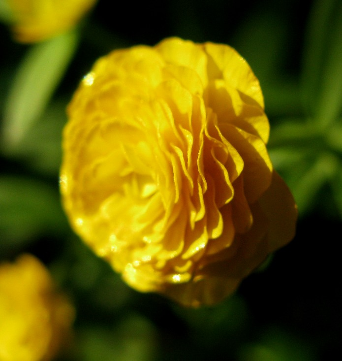 Махровая форма лютика однолистного (Ranunculus monophyllus) в культуре. Красноярский край, пос. Танзыбей.